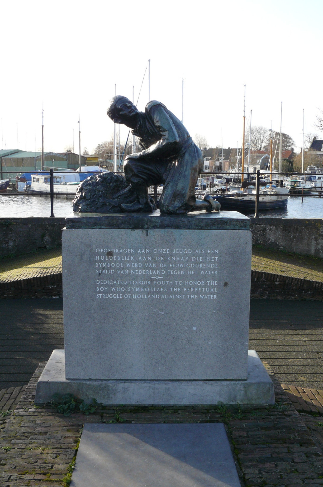 Beeld van Hansje Brinkers op de Woerdersluis in Spaarndam. Deze uitwateringsluis werd in 1611 gebouwd in opdracht van Grootwaterschap Woerden, dat van oudsher het boezemwater via het Hoogheemraadschap Rijnland naar zee loosde.